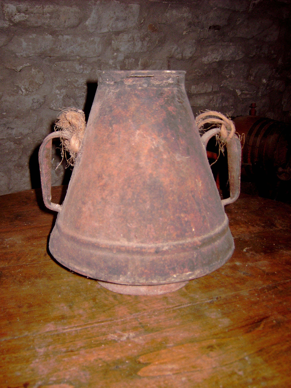 Cántaro de hojalata (Huesca). Aragonés: Cantre de Folla de lata.